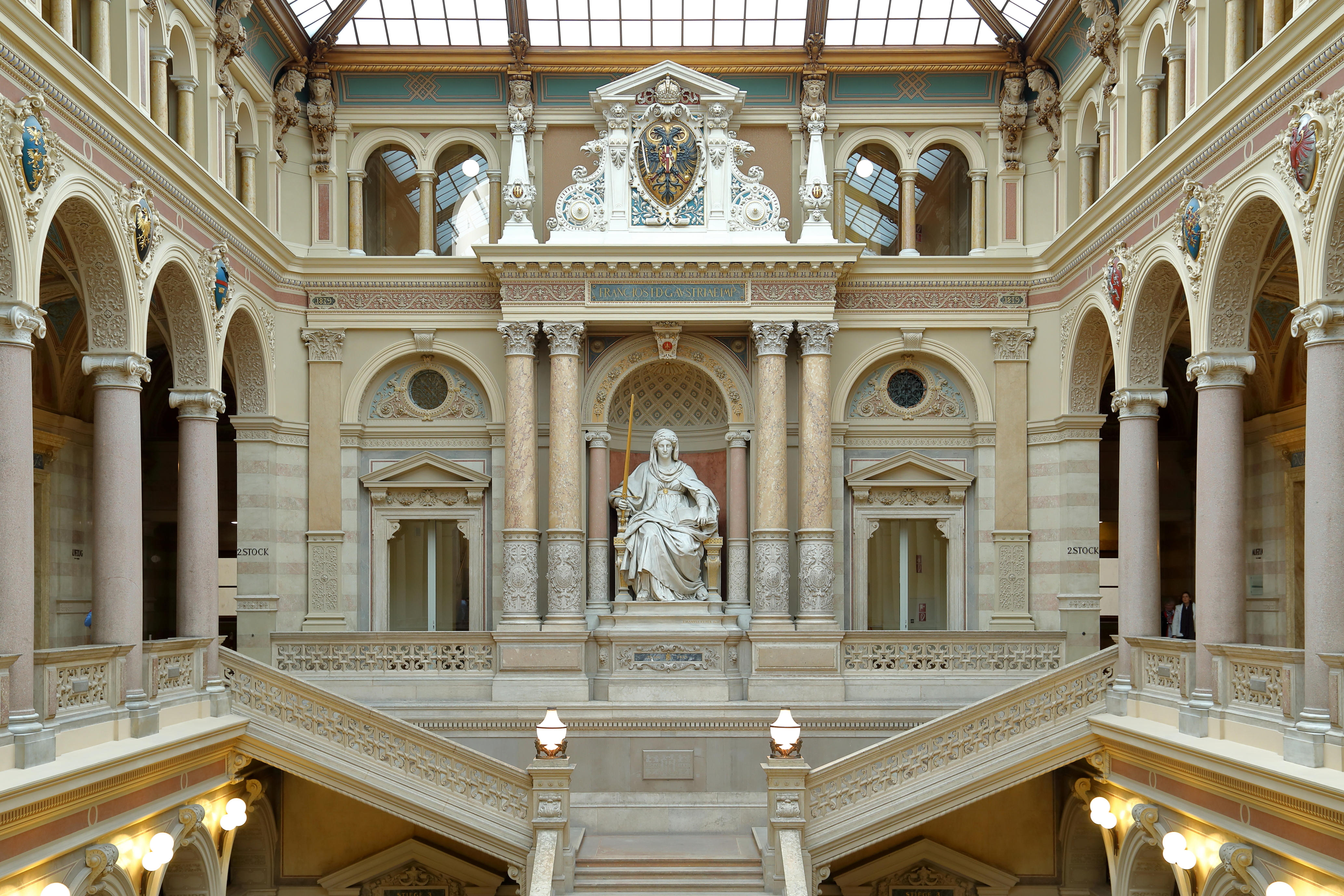 Der obere Bereich der pompösen Stiege mit der Statue Justitia in der Empfangshalle bzw. Aula des Justizpalastes im 1. Bezirk der österreichischen Bundeshauptstadt Wien.Der Justizpalast wurde von 1875 bis 1881 nach Plänen von Alexander Wielemans von Monteforte im Stil der Neorenaissance erbaut. Besonders prunkvoll ist die Empfangshalle, ein dreigeschossiger, glasgedeckter Arkadenhof mit einer Länge von 31m, einer Breite von 15m und einer Höhe von 23m. Vom Zentrum führt eine pompöse Freitreppe ins 2. Obergeschoss. Die optische Verlängerung der Stiege endet bei der monumentalen Marmorstatue Justitia, die sitzend mit einem Schwert und einem Gesetzbuch in einer Nische thront und über der Nische befindet sich das Kaiserlich-Österreichische Wappen.